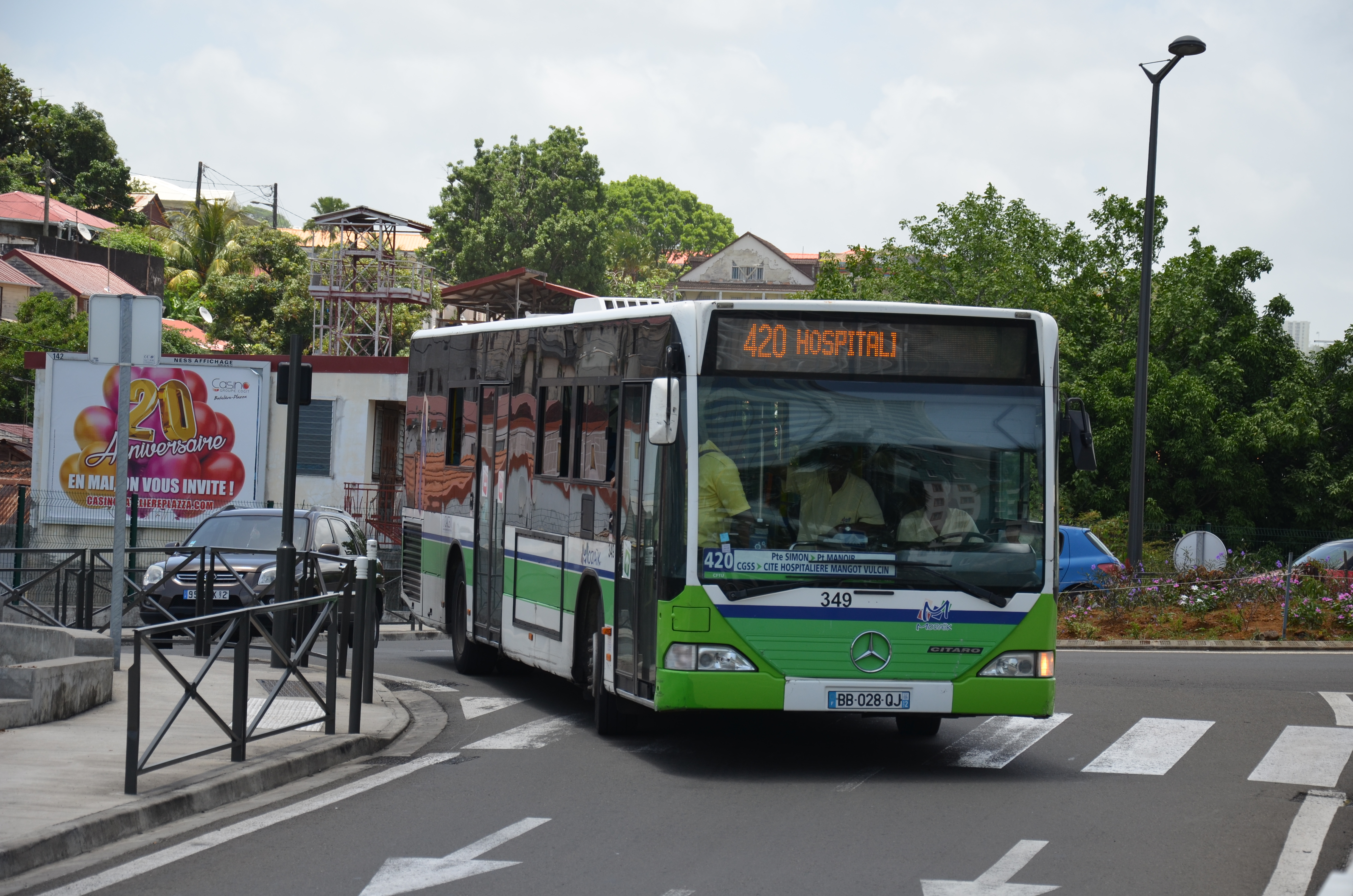 La ligne 420 est la plus fréquentée du réseau Mozaïk. Dès la mise en service du TCSP, celle-ci disparaîtra.